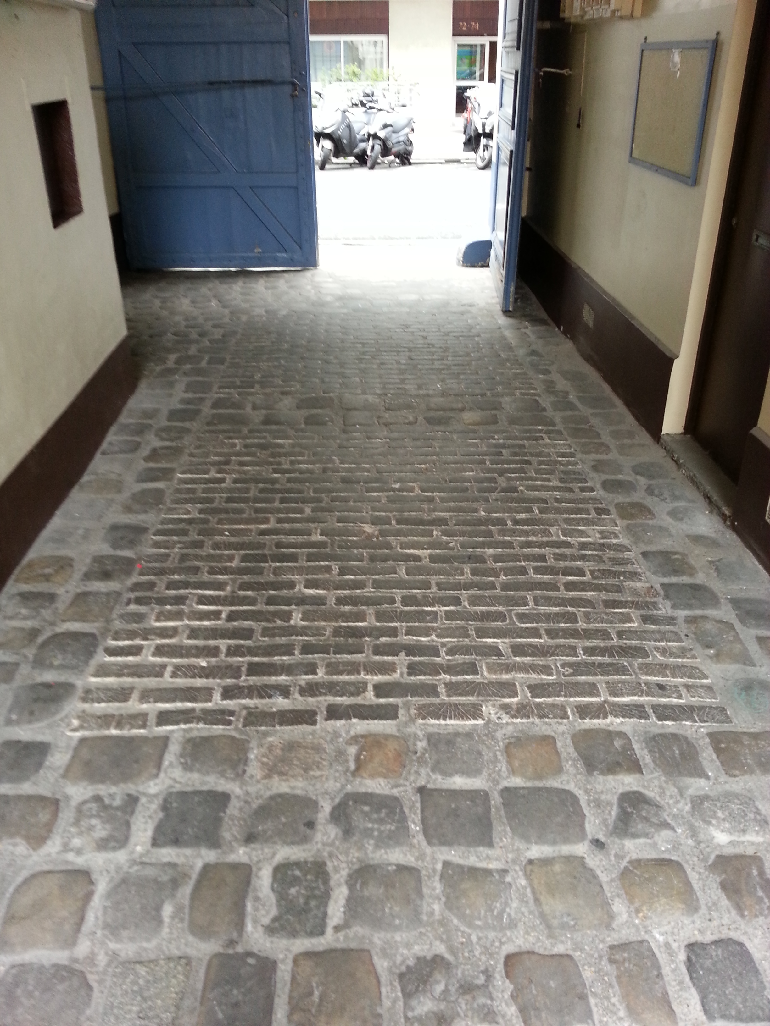 Pavage sous le porche du passage Saint-Maur dans le 11e arrondissement de Paris. Les deux rectangles centraux sont en pavés de bois.